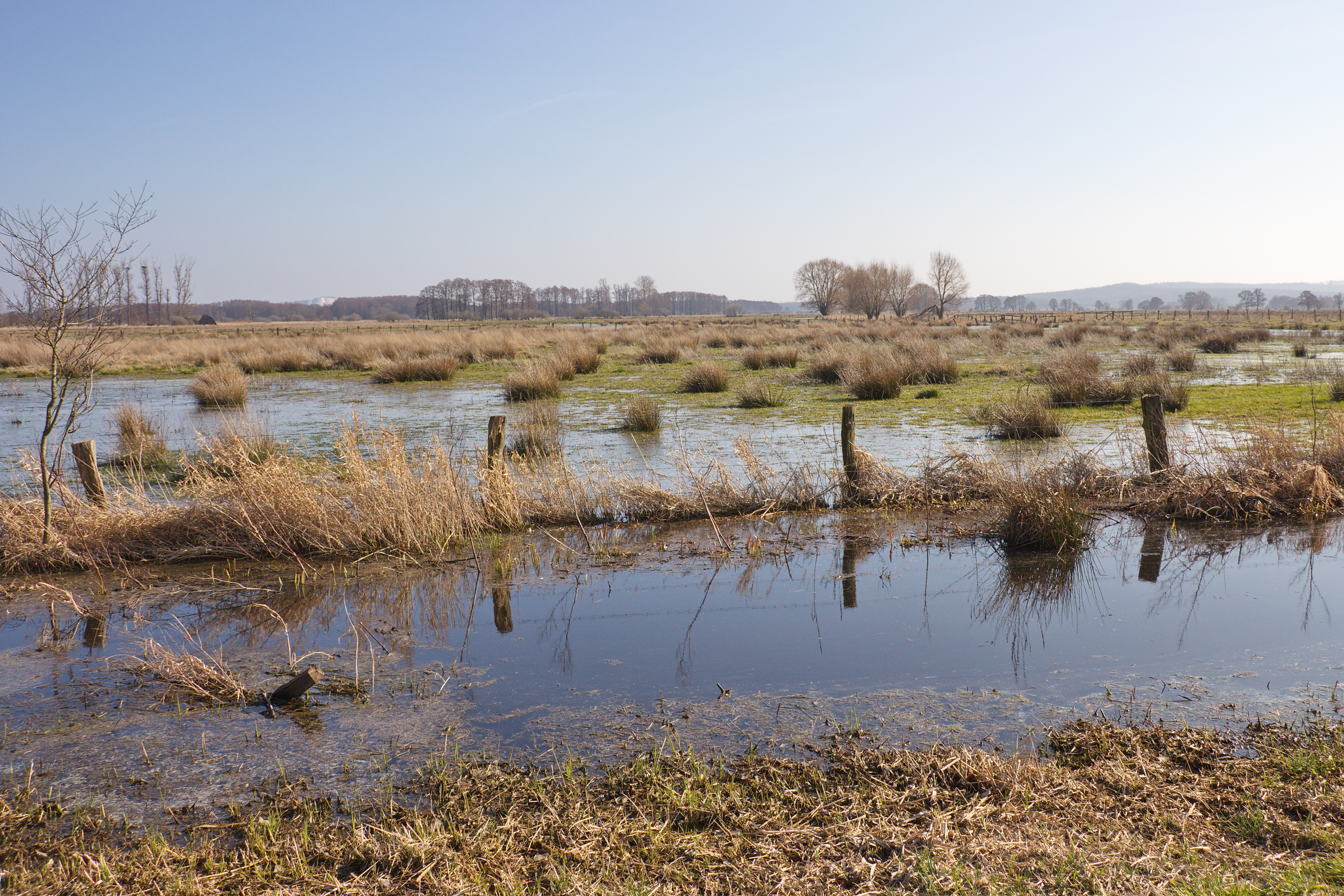 Naturschutzgebiet Meerbruchwiesen am Steinhuder Meer, Niedersachsen, Deutschland